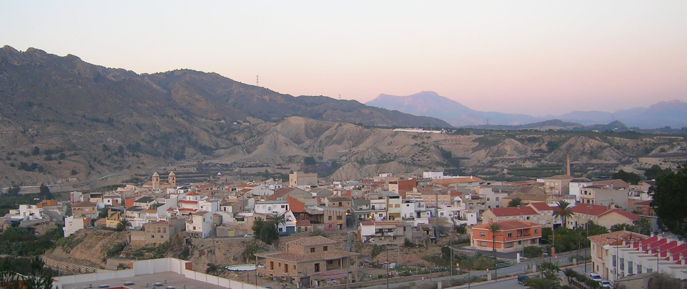 Villanueva del Río Segura, Murcia, España. Villanueva del Rio Segura, Murcia, Spain. Own picture, given to PD.